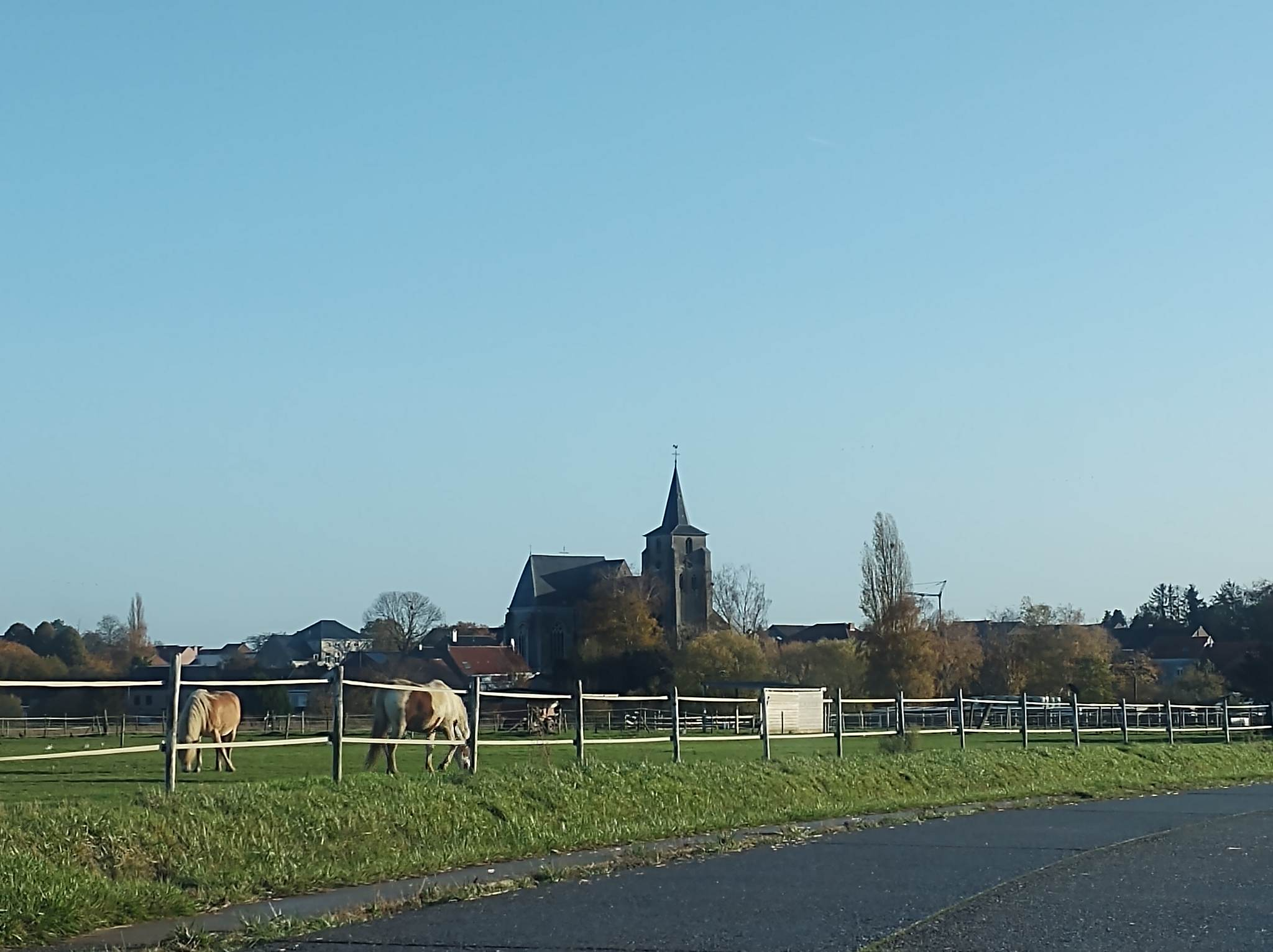 Olieverf op doek